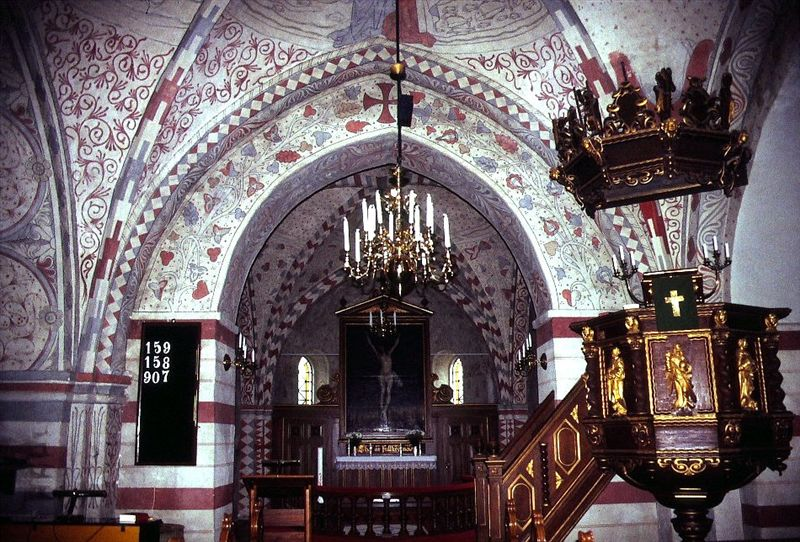 Vittskövle kyrka i Skåne, Sverige. Korbue og kor